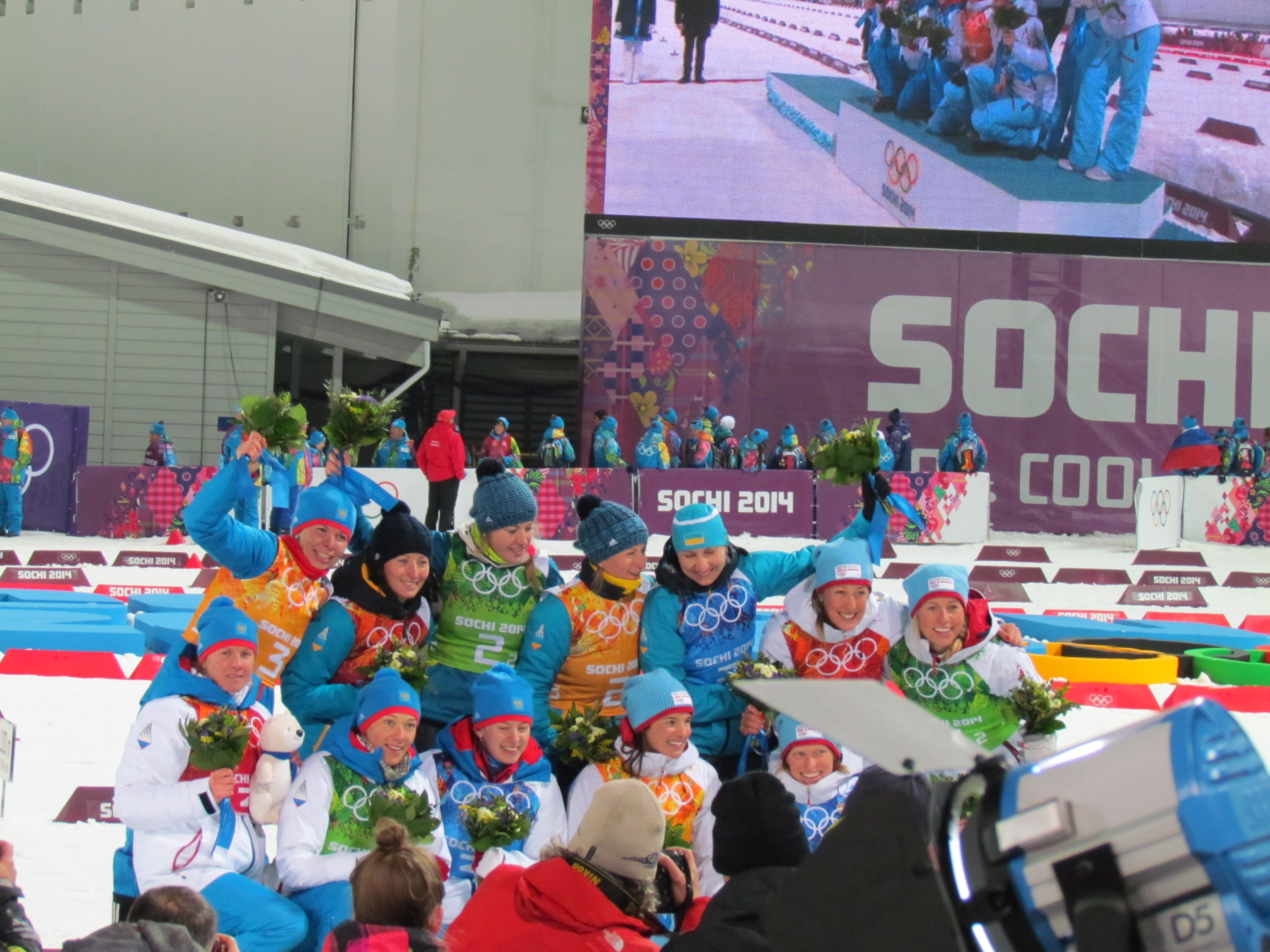 Зимові Олімпійські ігри 2014. Біатлон, жіноча естафета. Квіткова церемонія